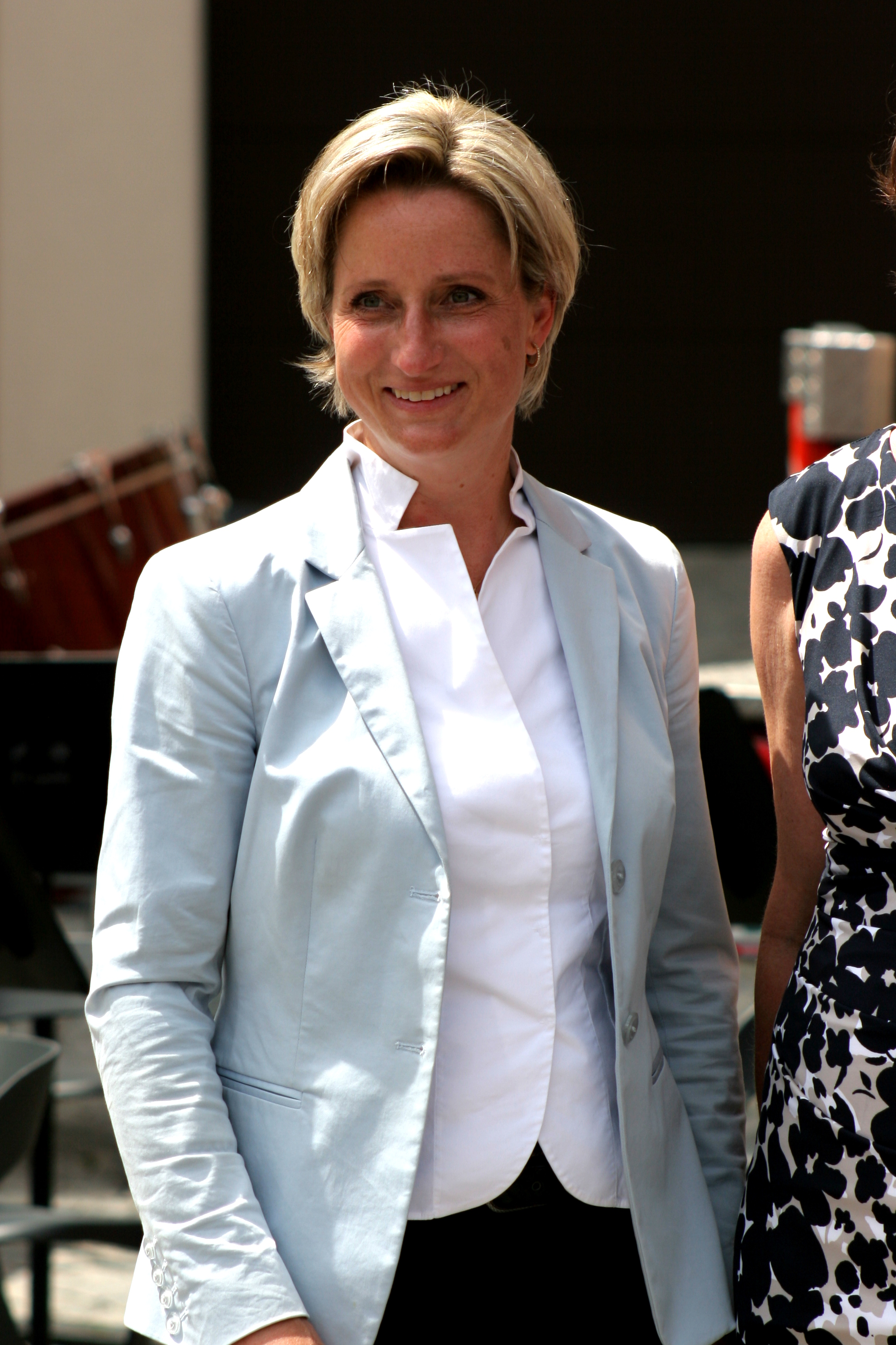 Nicole Hoffmeister-Kraut steht nach der Schwörrede 2019 neben Mitgliedern des Ulmer Gemeinderats, die soeben ihr Amtsgelöbnis abgelegt haben